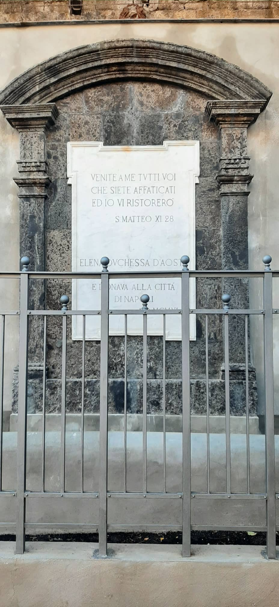 Particolare della Fontana di Capodichino (Calata di Capodichino)